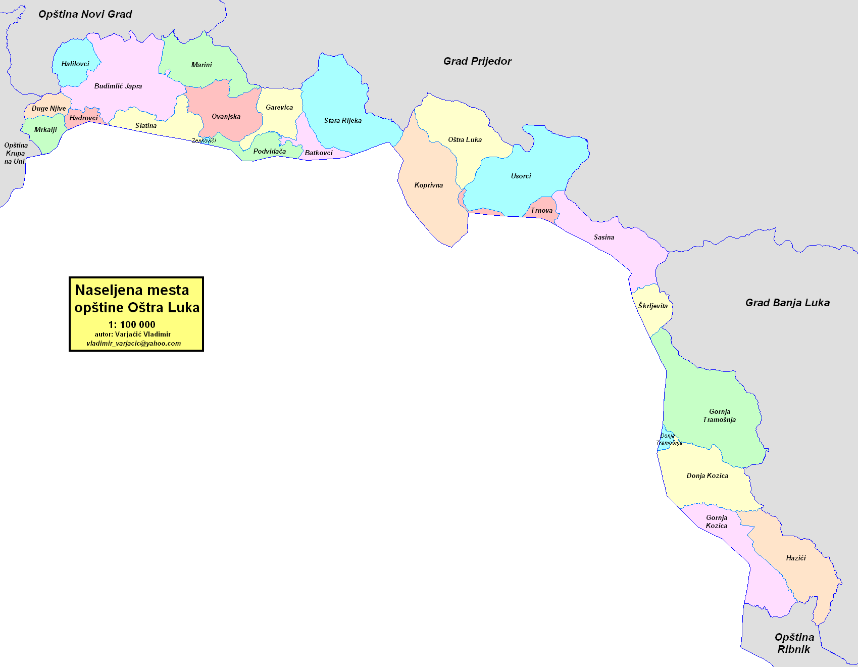 Opština Oštra Luka